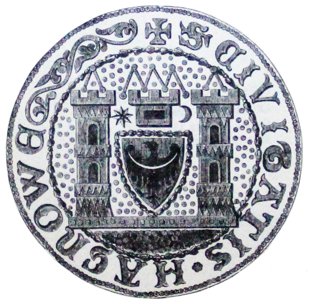 Rysunek przedstawiający najstarszą pieczęć miasta Chojnowa. Jej średnica wynosi 78 mm. Wyobraża w polu usianym gęsto perełkami wznoszące się nad grzbietem muru dwie wąskie wieże blankowe, każda o trzech kondygnacjach i trzech oknach. Między wieżami zawieszona jest tarcza trójkątna, a na niej orzeł heraldyczny Piastów dolnośląskich z wyraźnie zarysowaną sierpową przepaską przez pierś i skrzydła . Nad tarczą z orłem zawieszony jest pośrodku szczyt trzeciej wieży blankowej z szerokim prostokątnym oknem, zaś po jej bokach symbole: słońce po prawej stronie i sierp księżycowy po lewej. Nad blankami wież występują trójkątne daszki zarysowane grubszymi literami. W otoku pieczęci - napis częściowo uszkodzony, ryty literami wcześniejszej majuskuły goryckiej: + CIVITAS ... NOWE. Pozostałą część pola otokowego wypełnia ornament roślinny. Krawędź pieczęci w miejscu nazwy miasta wykruszona. Odlew pieczęci przechowywany jest w Muzeum Narodowym we Wrocławiu. Rysunek pochodzi z książki Chronik der Stadt Haynau in Schlesien, wydanej w 1869 roku